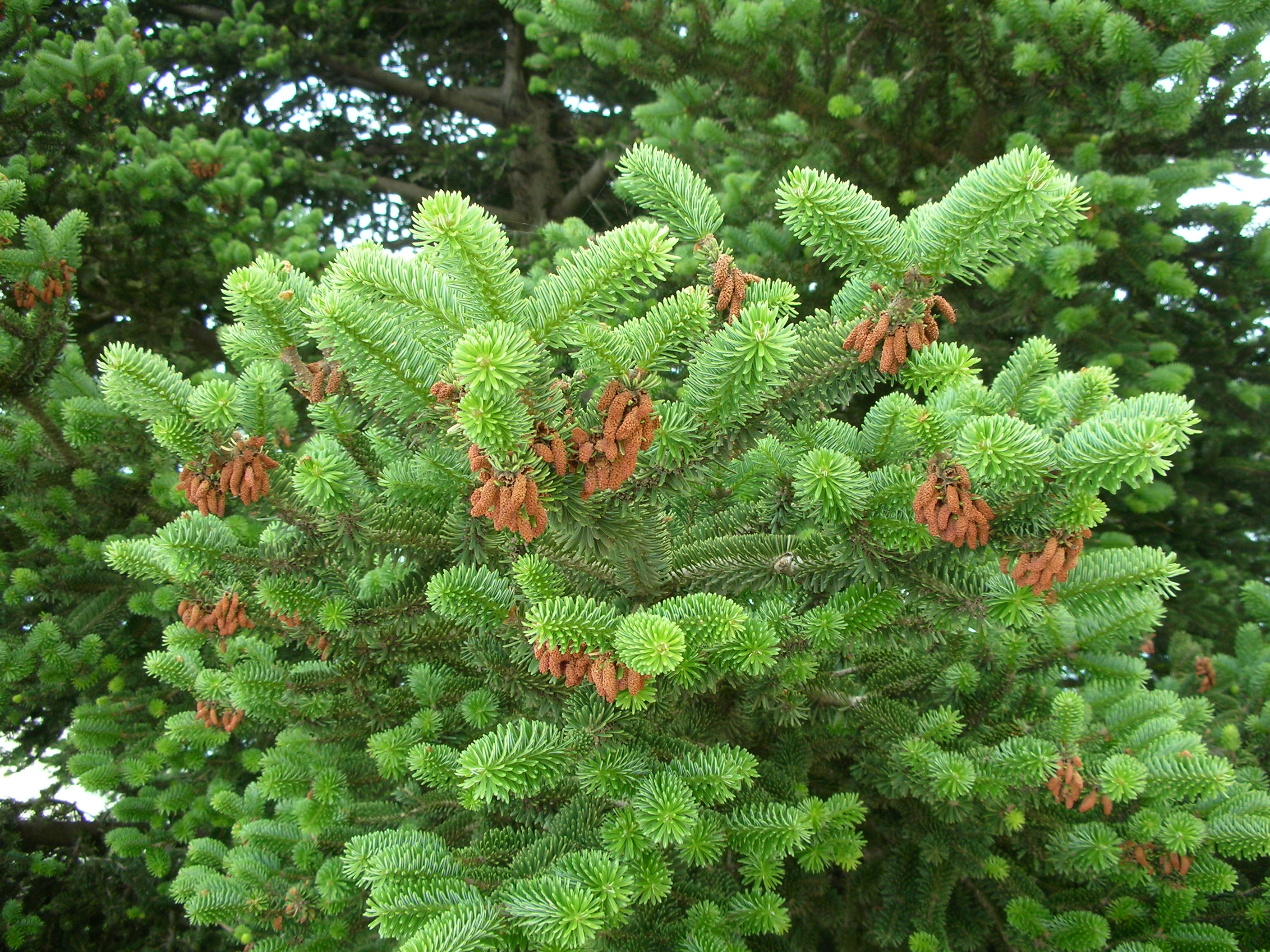 Abies cephalonica, Enos, Kefalonia